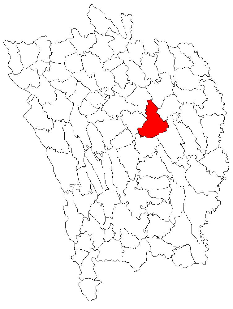 Categorie:Hărţi ale judeţului Vaslui